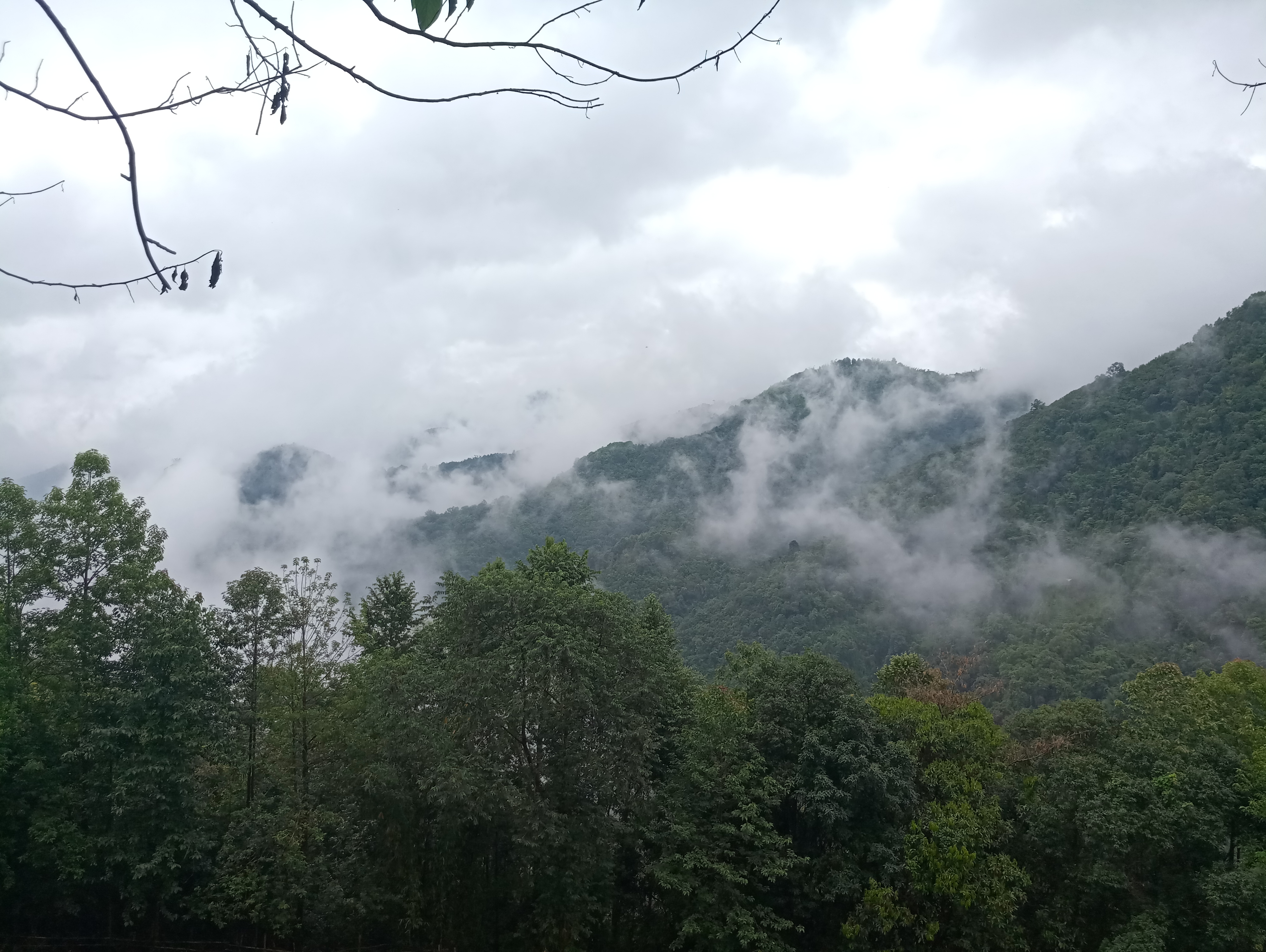 芒市遮放镇东山的山区